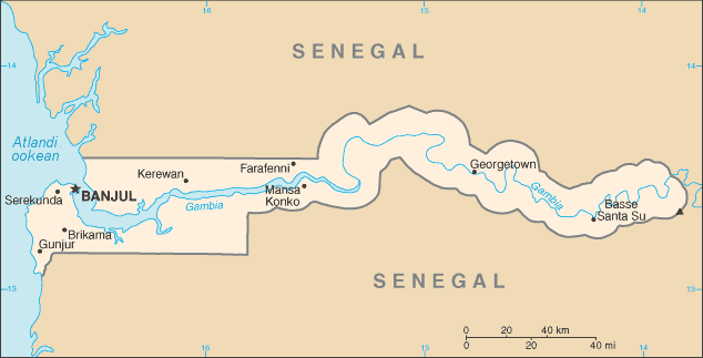 Gambia kaart